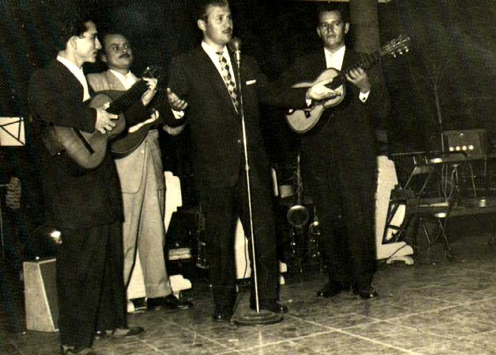 Concierto con Víctor Hugo Ayala